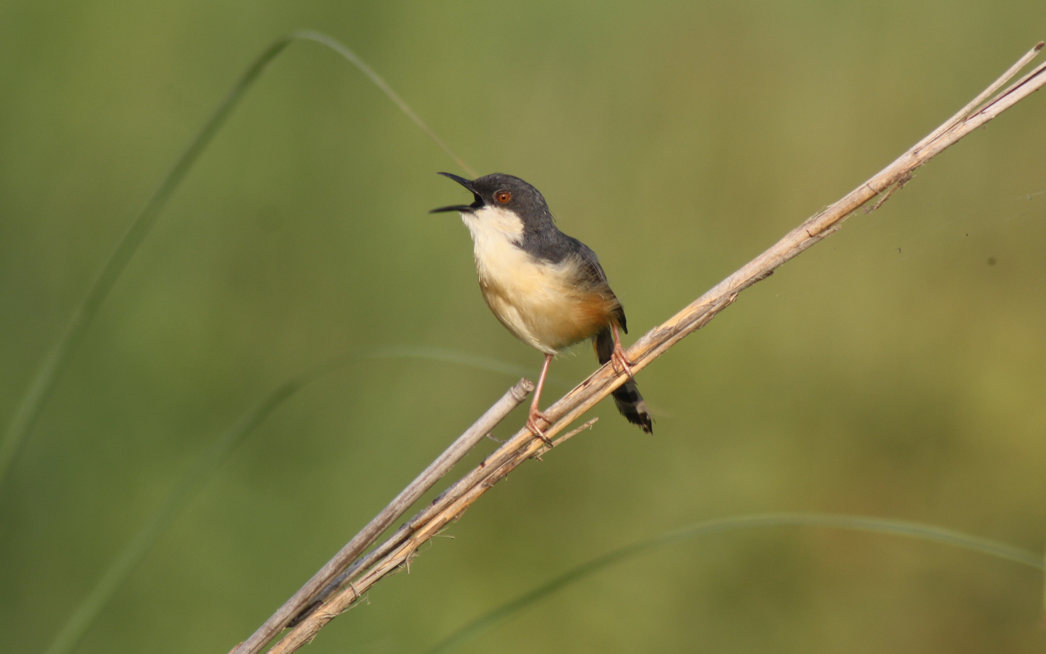 കതിര്‍വാലന്‍ കുരുവി, അടാട്ട് കോള്‍പ്പാടത്ത് നിന്ന്